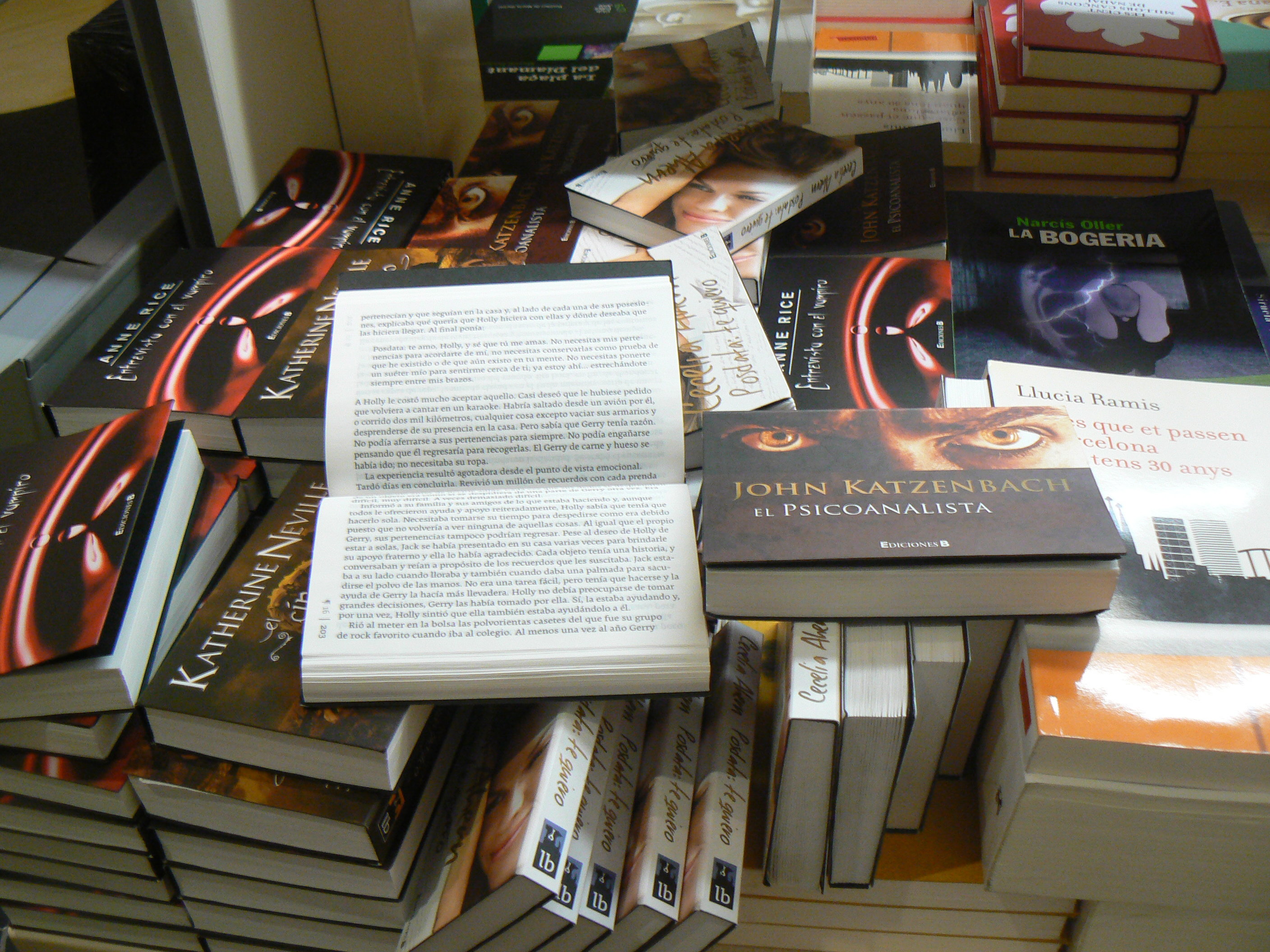 Llibre de butxaca de format aparegut en 2010 als Països Catalans. La seva mida és menor a la dels fins aleshores dits "de butxaca", es llegeixen en horitzontal i es poden agafar amb una sola mà. Les pàgines són fines però fàcils de passar, la tapa és dura i resistent, la lletra és més gran i clara que les dels antics llibres de butxaca.